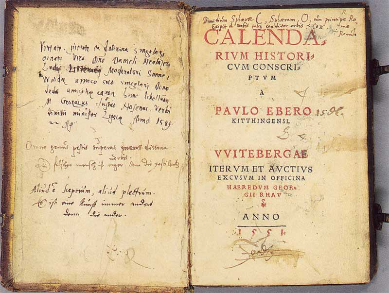 "Calendarium historicum" Schrift Paul Ebers selbstfotografiert gemeinfrei